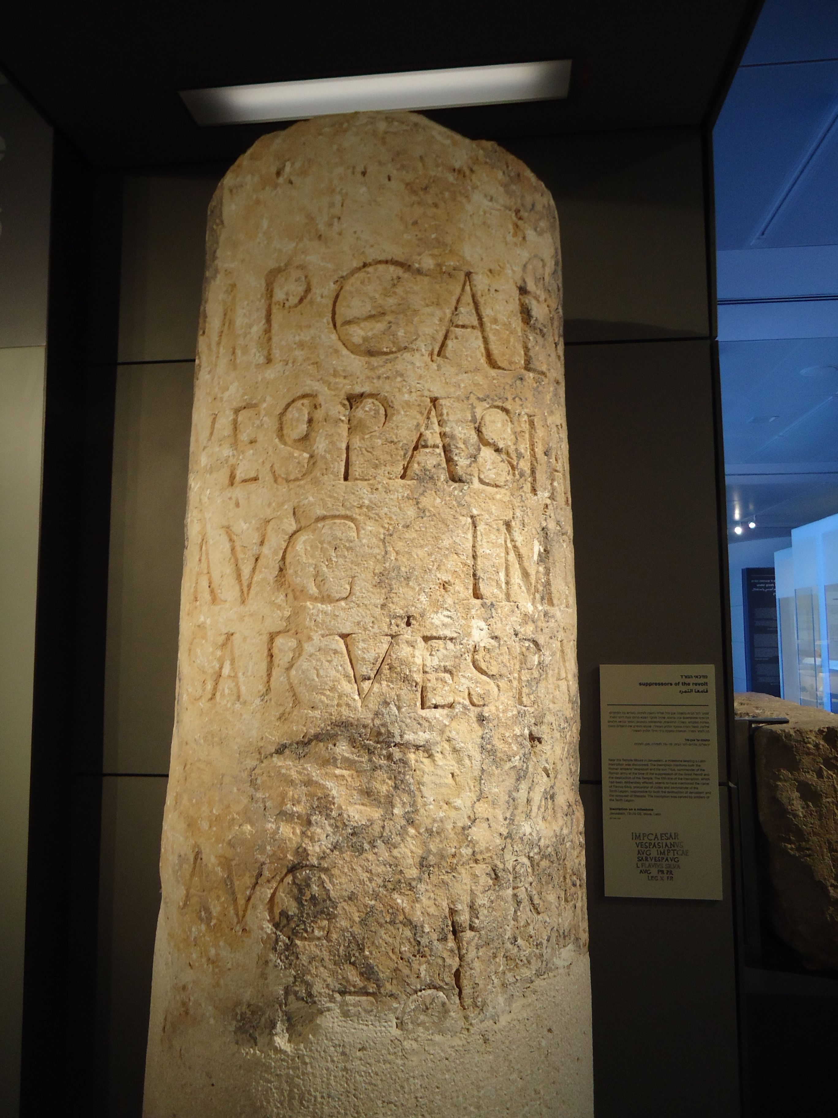 עמוד נושא כתובת המציינת את שמות הקיסרים אספסיאנוס וטיטוס, וכן את הלגיון העשירי פרטנסיס ומפקדו, אשר שמו נמחק מהכתובת, נתגלה בשימוש משני בקיר הארמון האומאי השני. תאריך הכתובת נקבע בהתאם לשנים 71-79 לסה"נ. חוקרים שונים ראו במפקד הלגיון פלביוס סילבה, כמפקד אשר שמו נמחק מן הכתובת.